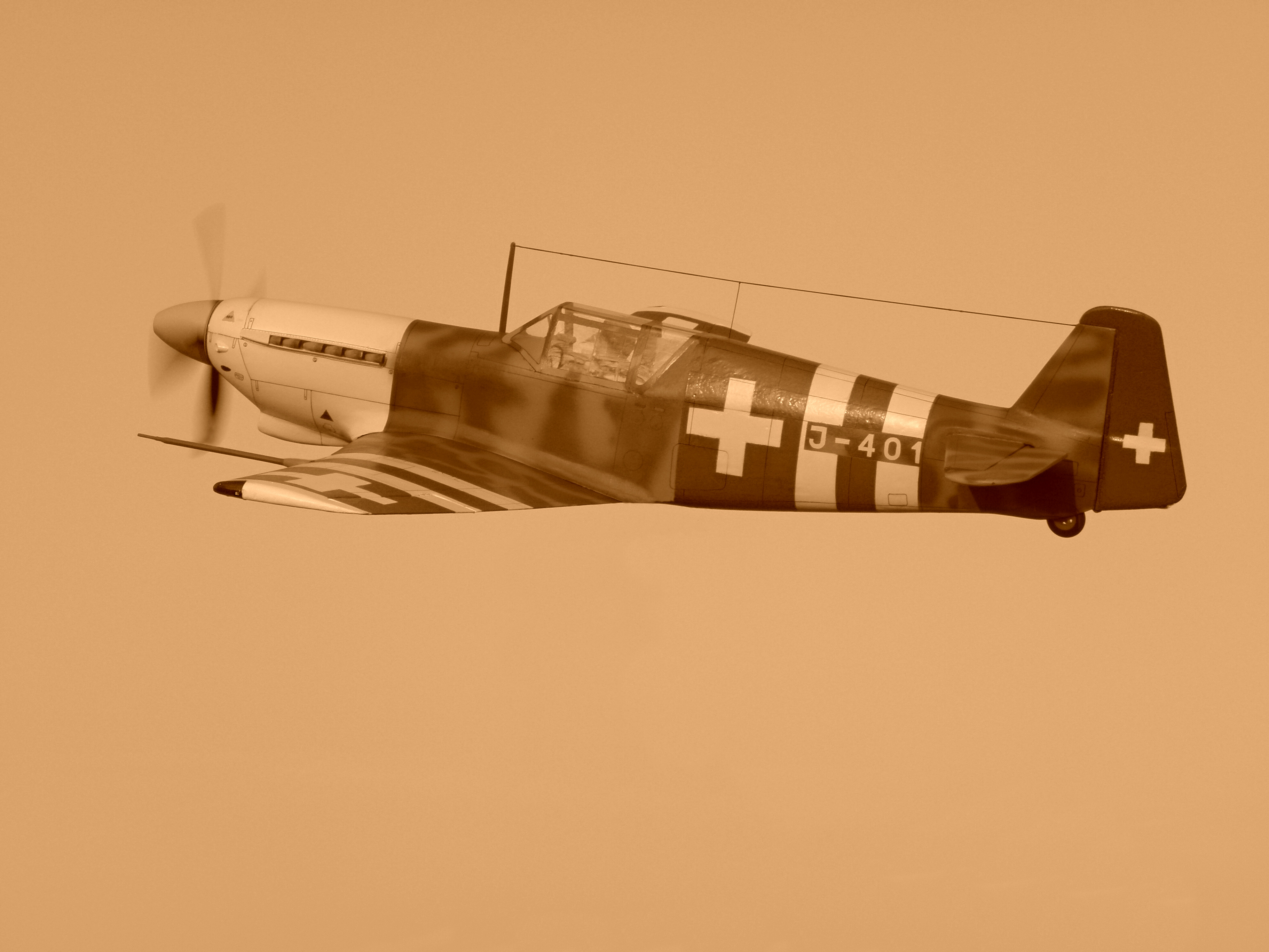 Prototyp D-3802